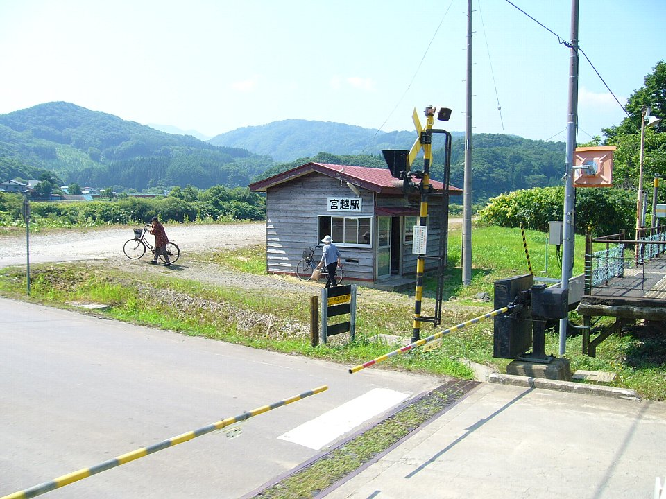 江差線 宮越駅